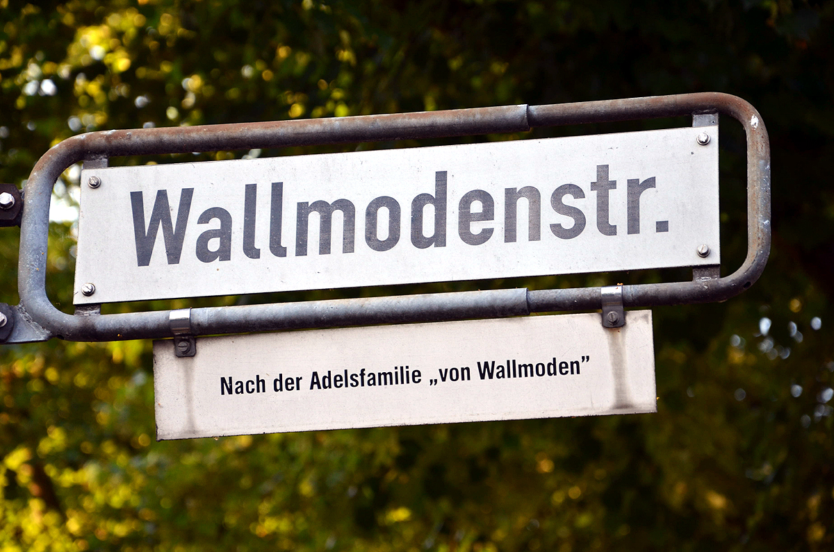 Die Legende am Straßenschild Wallmodenstraße in Hannover-Kleefeld dokumentiert: „Nach der Adelsfamilie «von Wallmoden»“ ...